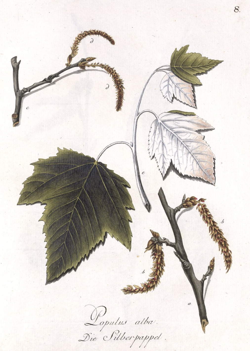 Abbildung Der Hundert Deutschen Wilden Holz-Arten Nach Dem Nummern-Verzeichnis Im Forst-Handbuch Von F. A. L. Von Burgsdorf; Tafel: Silberpappel (Populus alba) Erklärung